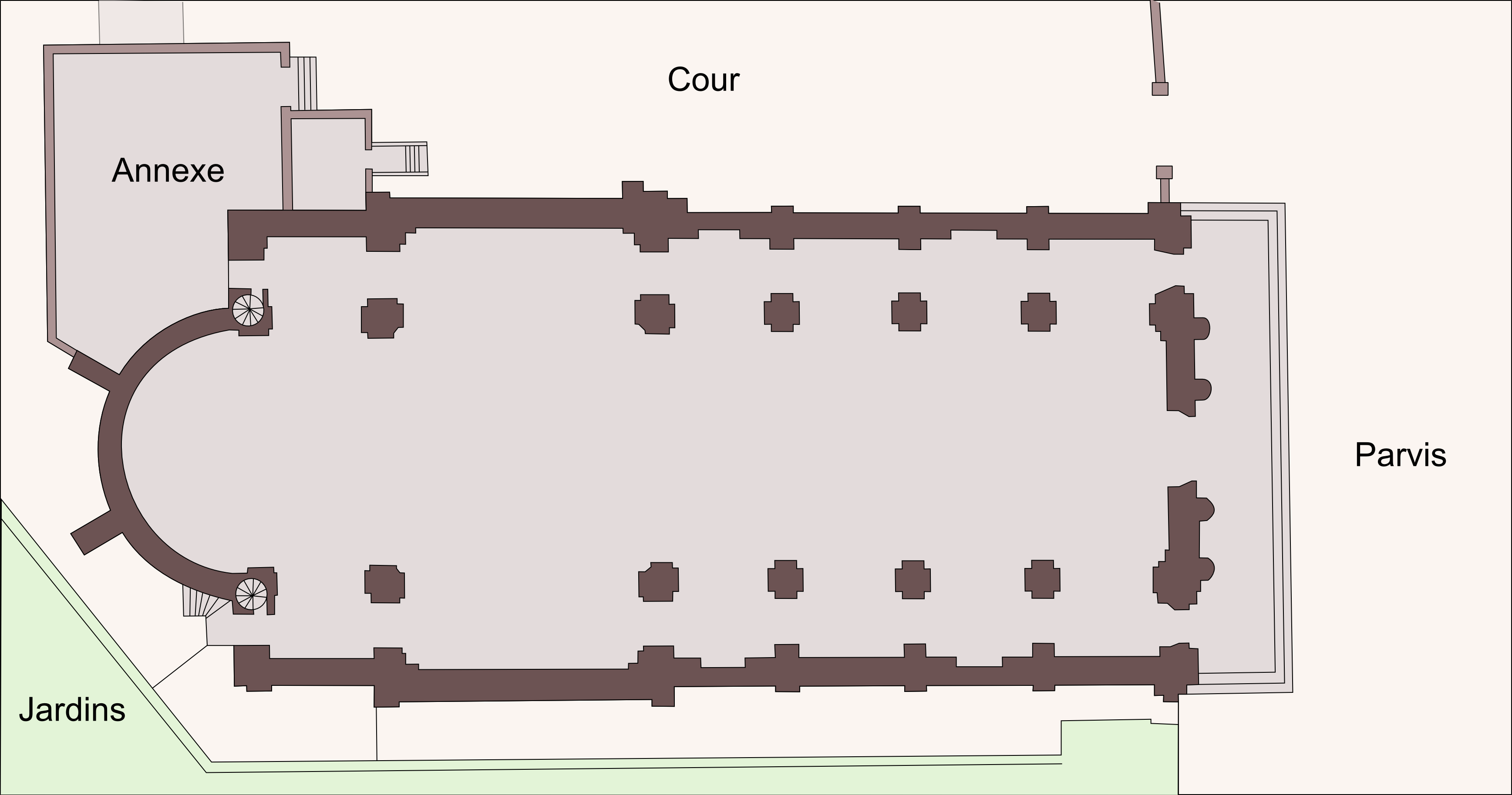 Plan de l'église Notre-Dame-de-la-Gloriette à Caen (Calvados, France)